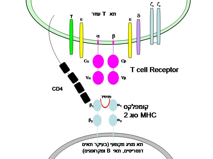 קומפלקס MHC מסוג II המוצג על תא מציג מקצועי וקישורו לקולטן של תא T עוזר. קומפלקס MHC כולל שתי שרשראות חלבוניות - אלפא ובטא - ופפטיד שמקורו בפתוגן שהתא המציג בלע. תאי T מציגים את קולטן תאי ה-T הכולל את שרשראות אלפא ובטא הנקשרות לקומפלקס MHC ואת שרשראות גמא, דלתא, אפסילון וזיטא המעבירות אותות לפנים התא. תאי T עוזרים נושאים גם את החלבון CD4 הנקשר לקומפלקס ה-MHC באזור אחר.